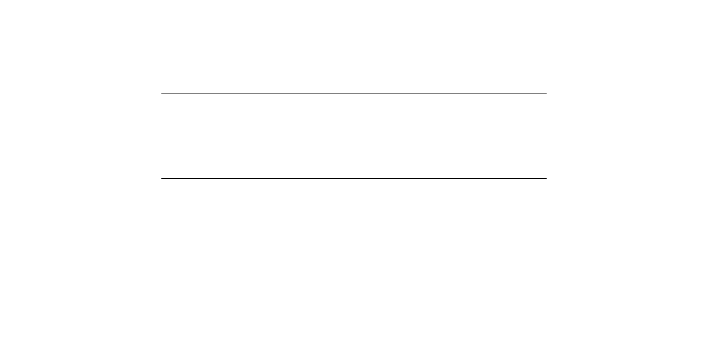 etape6